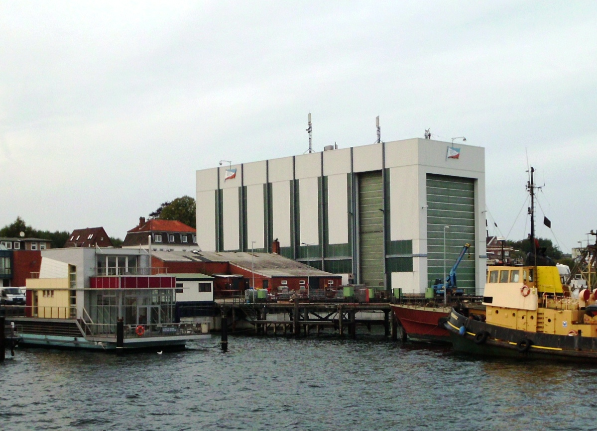 Friedrichwerft in Kiel, Schiffbauhalle und Schwimmendes Haus